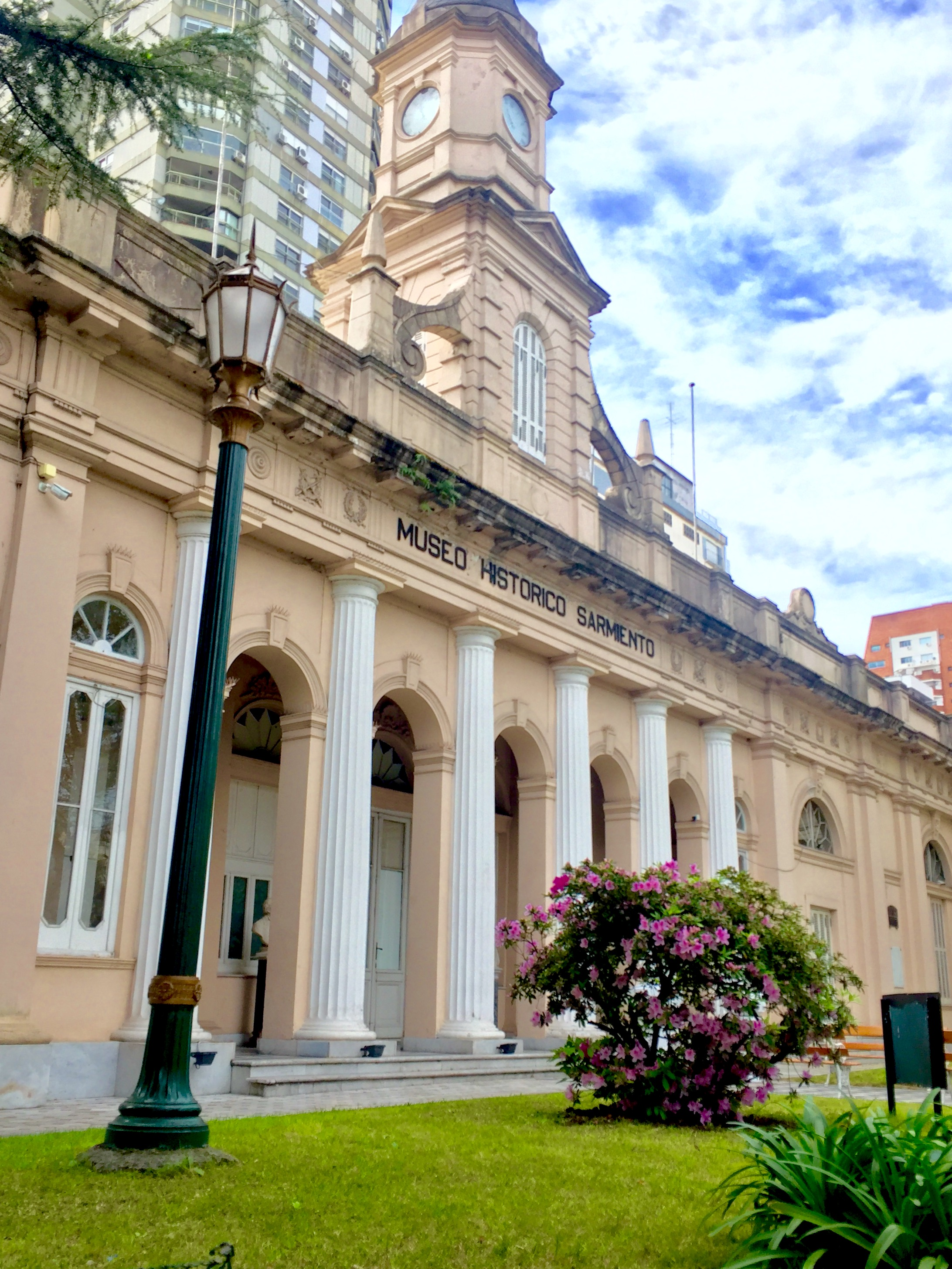 Museo histórico Sarmiento